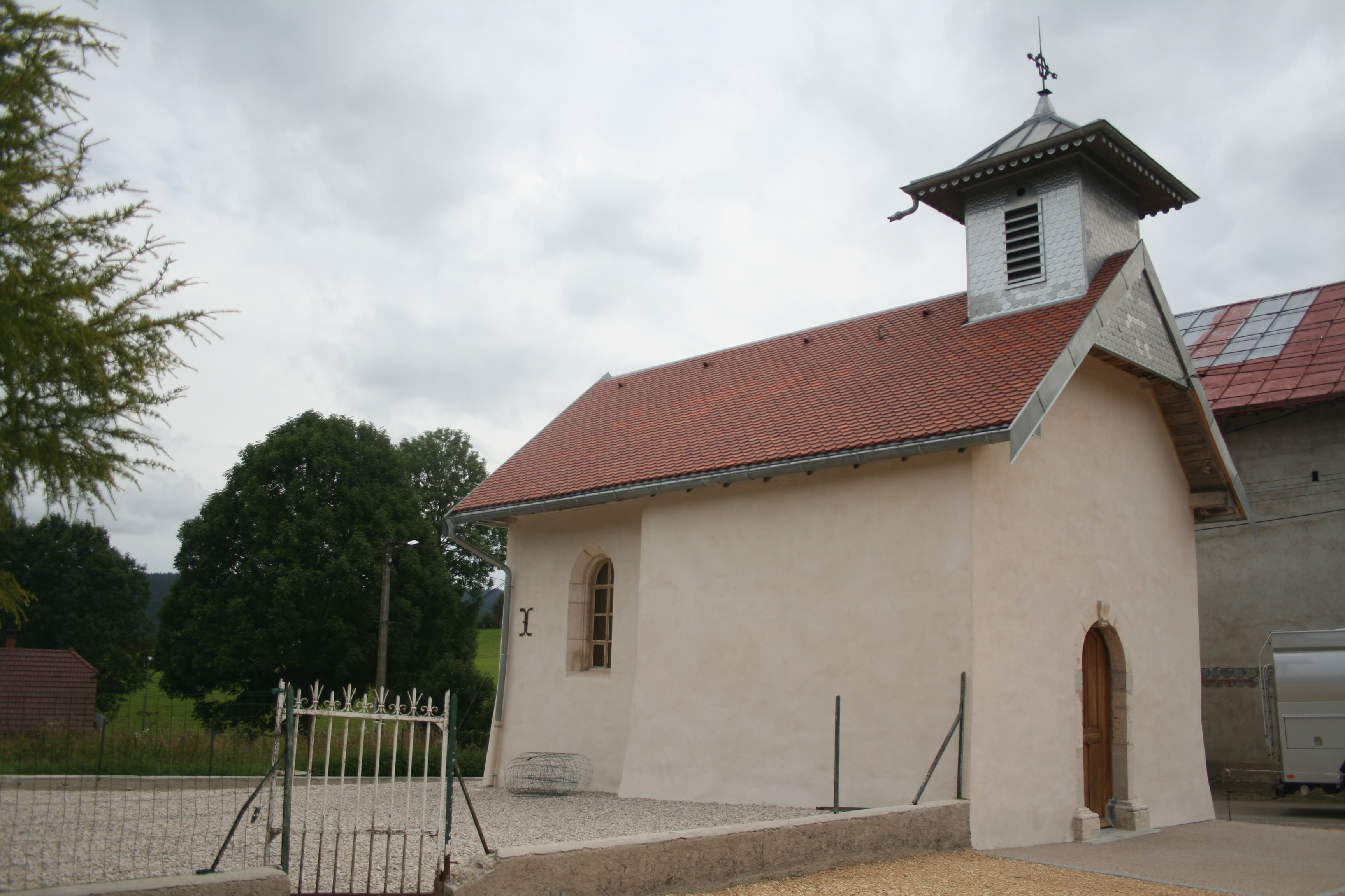 Chapelle de Maison-du-Bois (Doubs)